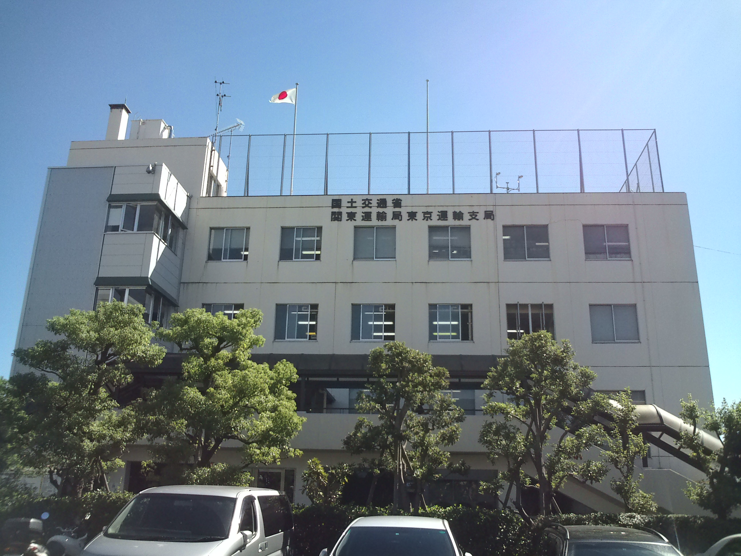 国土交通省関東運輸局東京運輸支局の庁舎